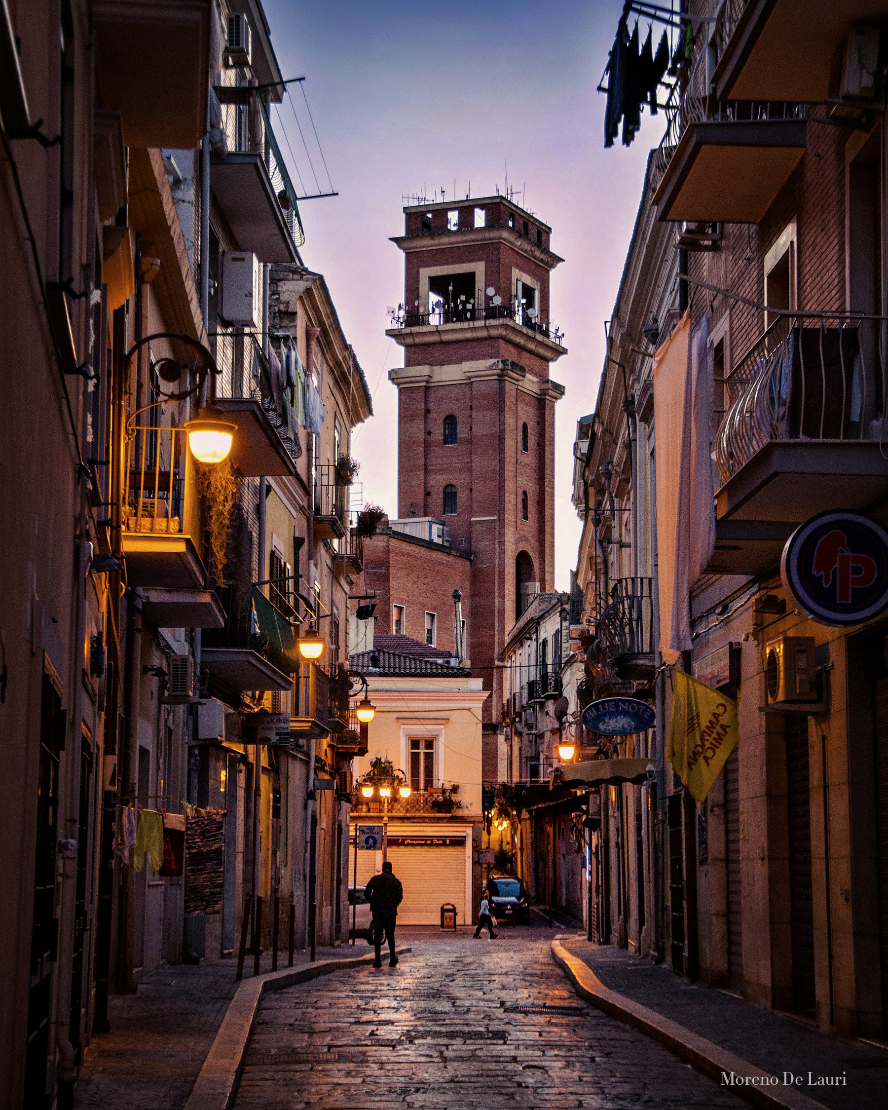 Torre Municipio Foggia